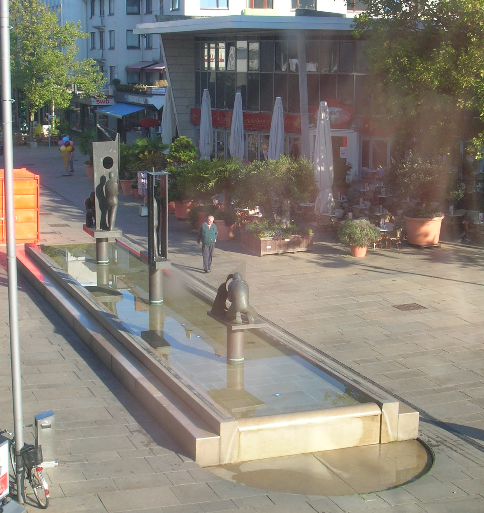 Denkmal für die Werftarbeiter, Bremerhaven-Mitte